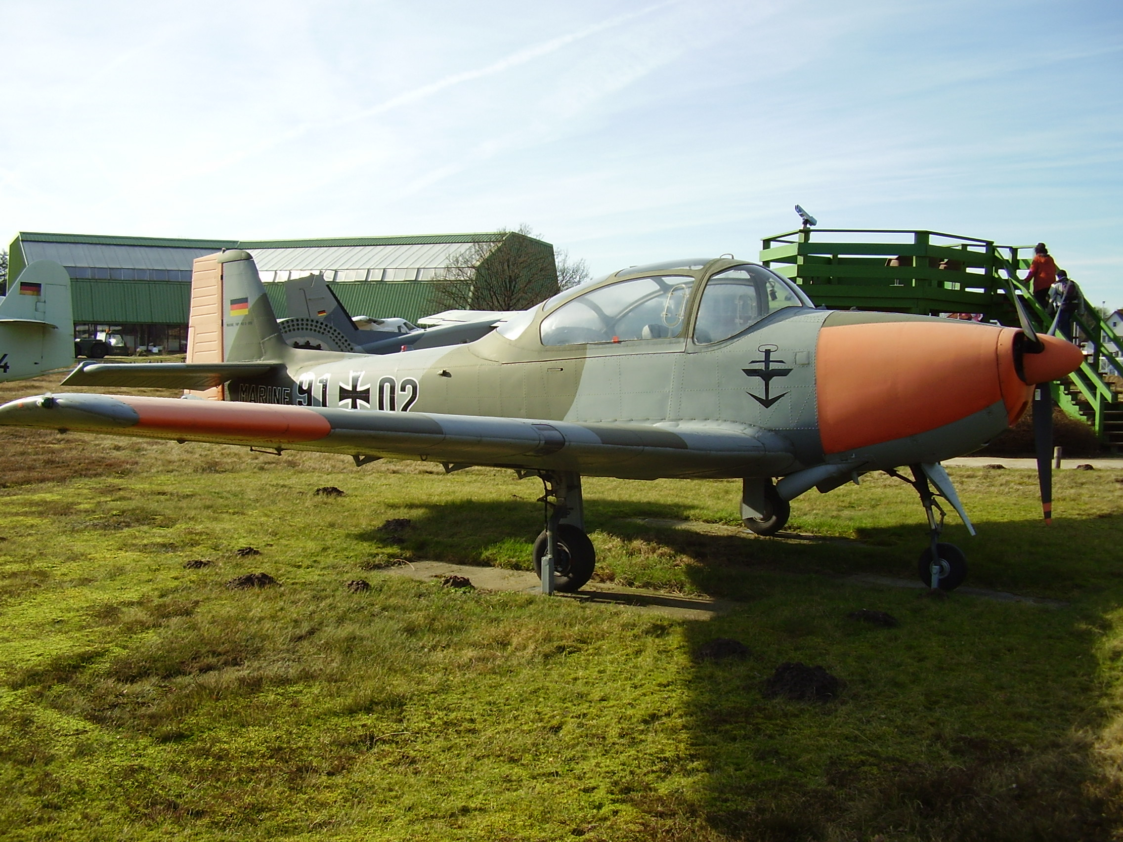 Aeronauticum in Nordholz, Luftschiffe, Zeppelin, bei Cuxhaven, Luftfahrtmuseum